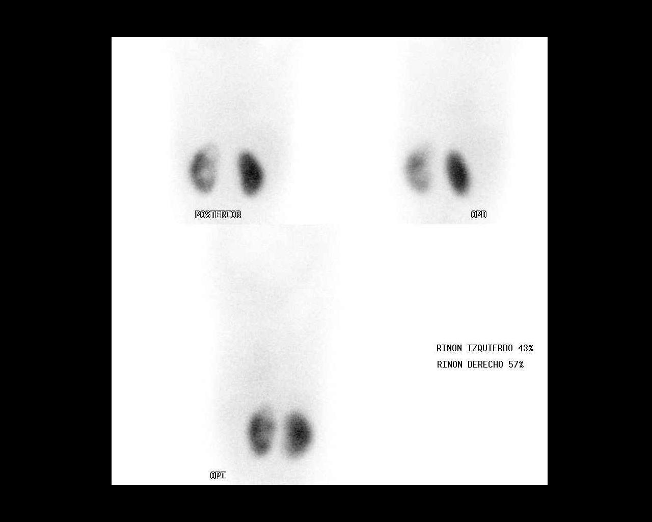 El riñon derecho se observa adecuadamente, el riñon izquierdo tiene menor captacion del trazador y un area dominante de hipocaptacion en el polo superior por infeccion(pielonefritis.)